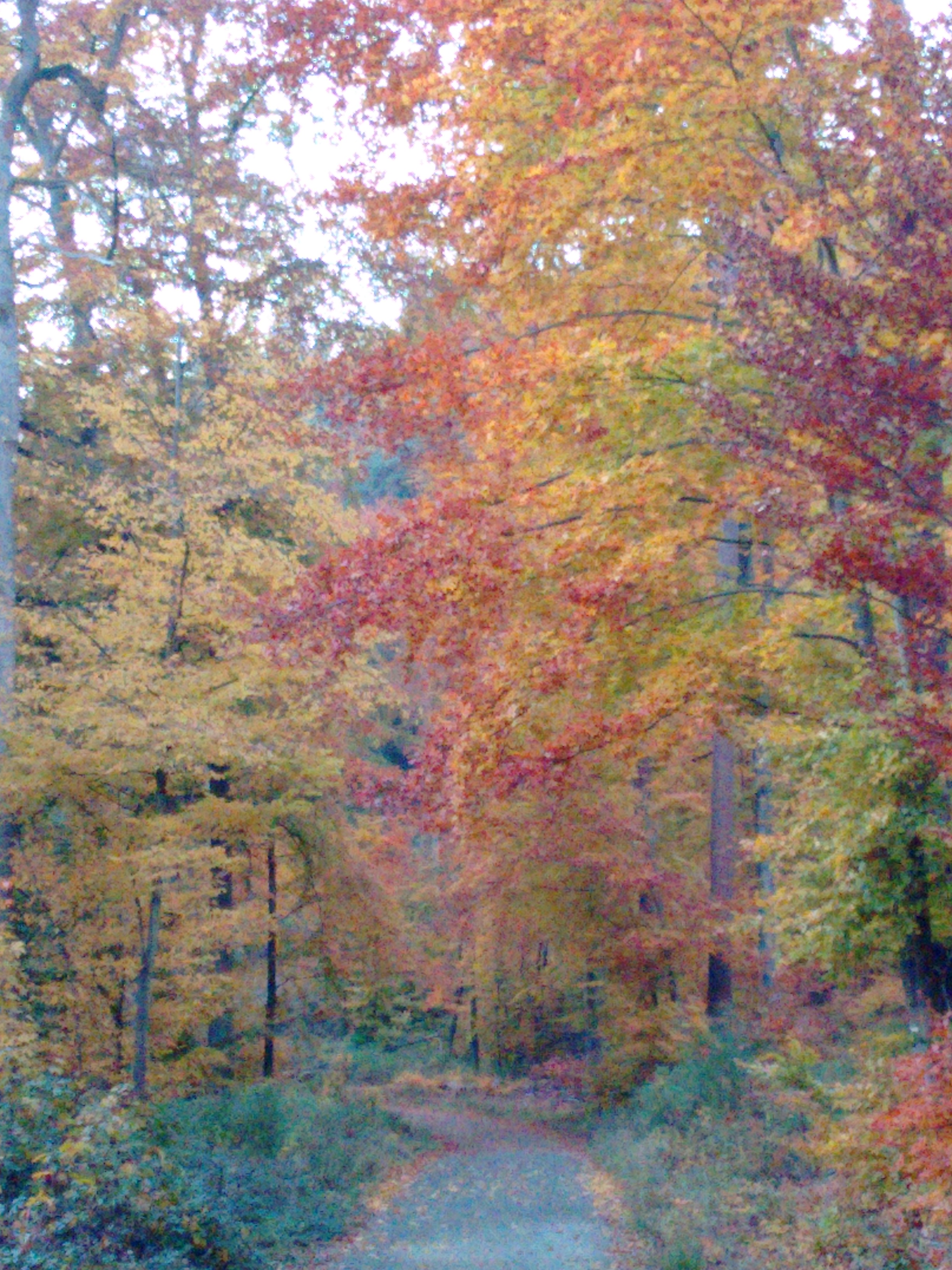 Pfälzer Wald am Gelterswoog